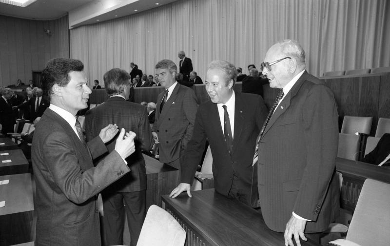 22.9.1988 Festakt im Plenarsaal des Bundesrates anläßlich des 40-Jahrestages der 1. Sitzung des Parlamentarischen Rates an gleicher Stelle. Eine von Bundesrat-Präsident, Ministerpräsident Dr. Bernhard Vogel enthüllte Gedenktafel erinnert an dieses historische Datum. Festredner: Prof. Dr. Rudolf Morsey